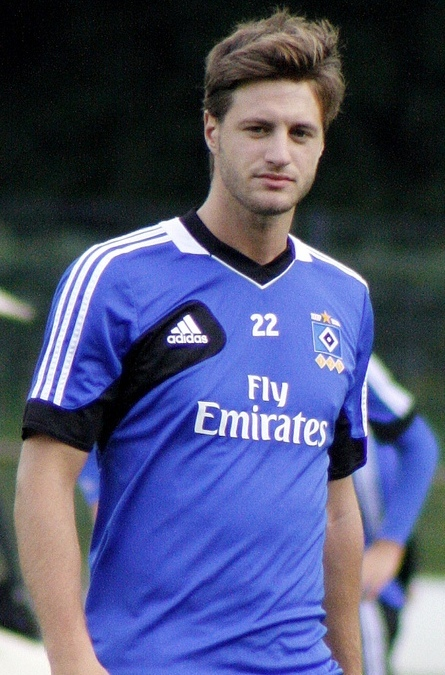 Jacopo Sala beim Training des HSV am 7. August 2012